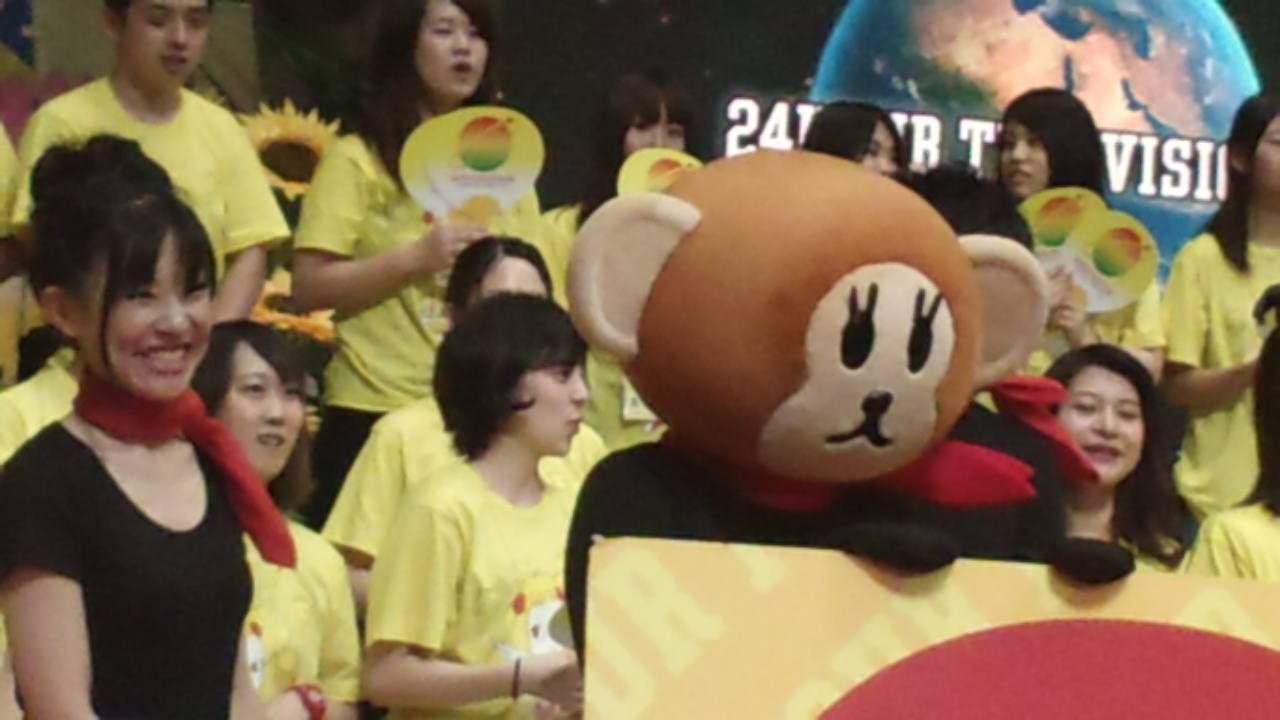 大阪の民放テレビ局・読売テレビ放送のマスコットキャラクター「ウキキ」（2014年8月 MASA (talk)が大阪市ツイン21で行われた日本テレビ「24時間テレビ」募金イベント会場で撮影）